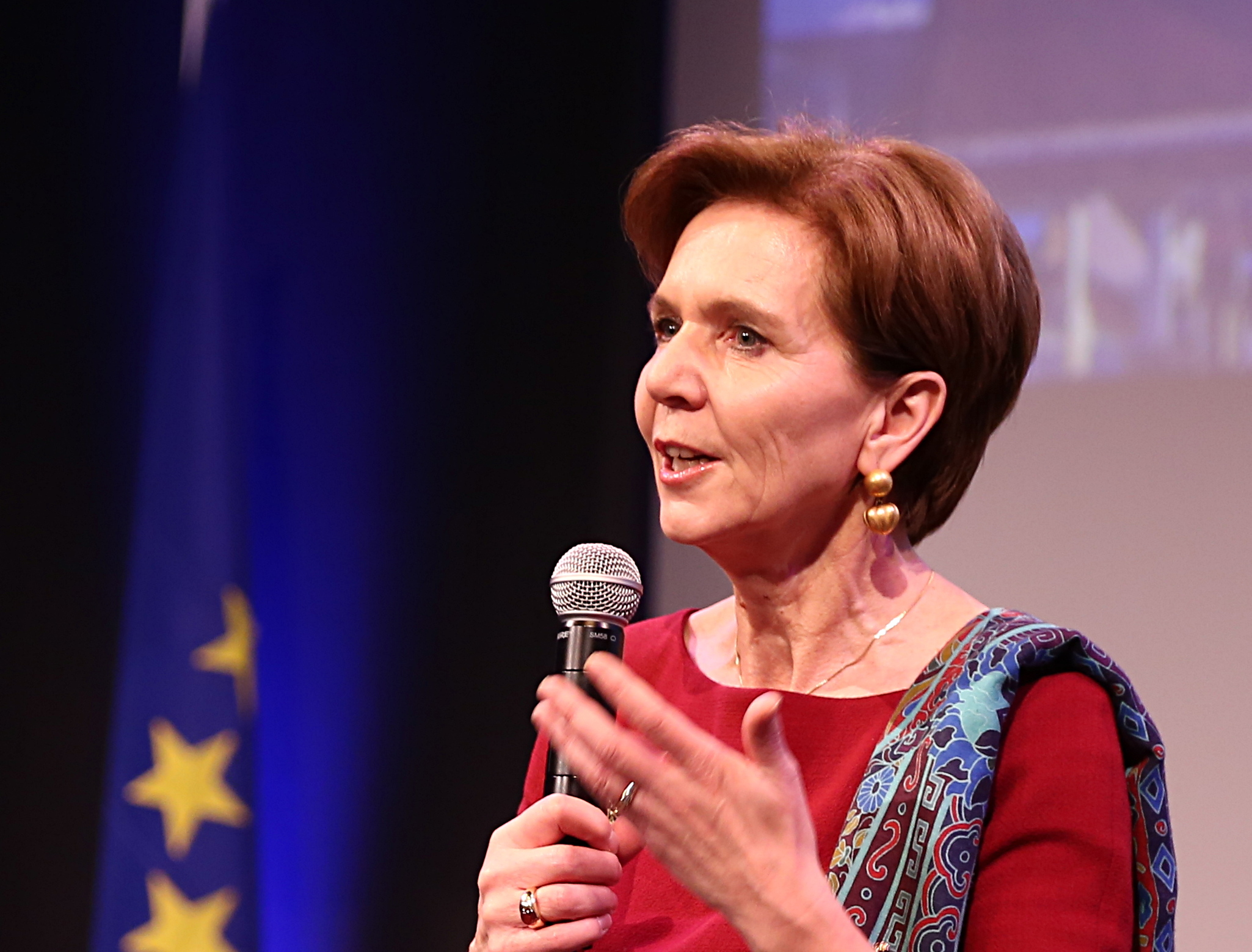 Brigitta Pallauf, Rpäsidentin des Landtags von Salzburg beim EUSALP-Jahrestreffen 23./24. November 2017 in München